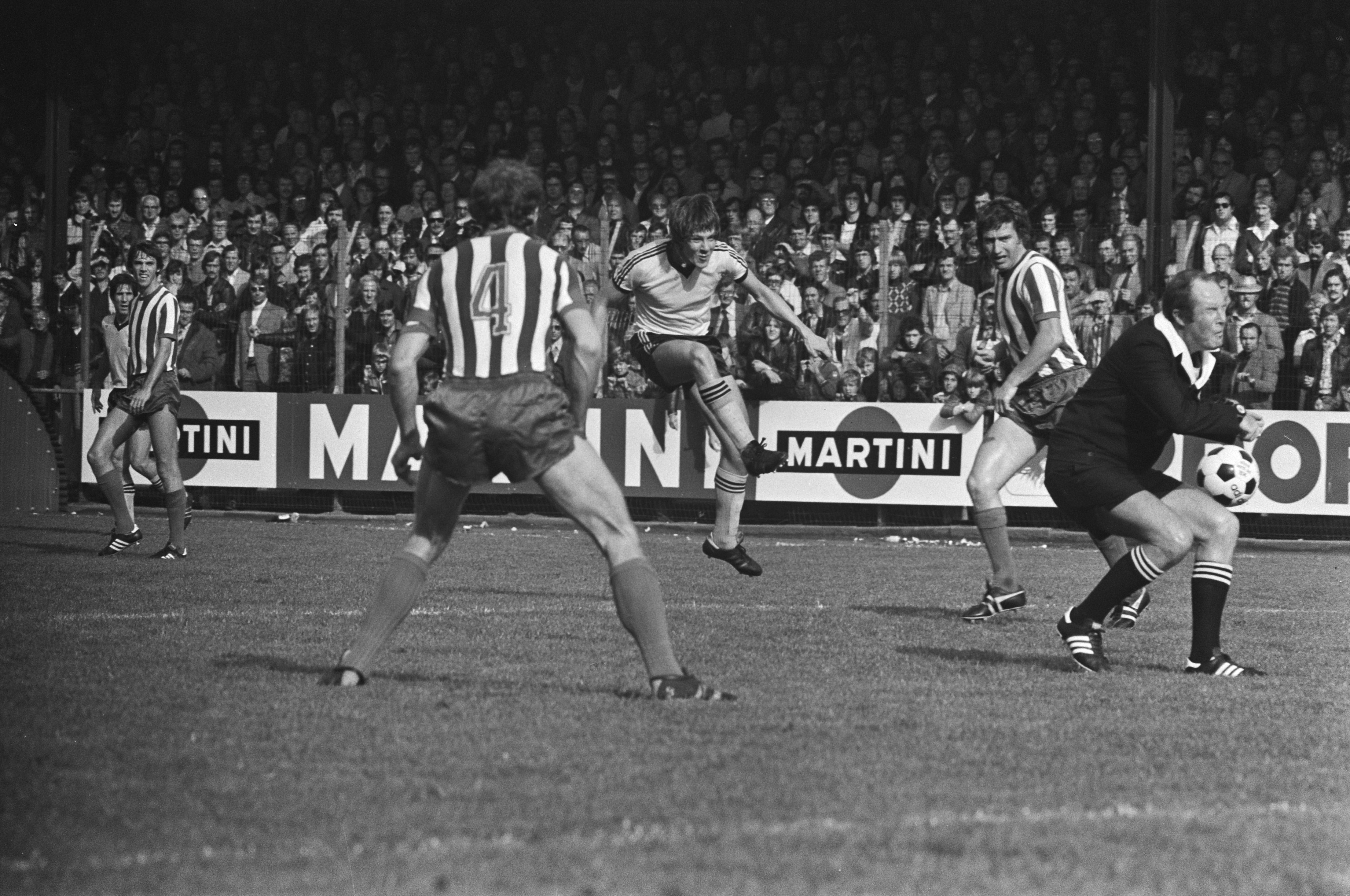 Collectie / Archief : Fotocollectie Anefo Reportage / Serie : [ onbekend ] Beschrijving : Eindhoven tegen Roda JC 0-0; scheidsrechter Vervoort wordt door bal getroffen na schot van Jens Kolding (Roda JC) Datum : 26 september 1976 Locatie : Eindhoven Trefwoorden : scheidsrechters, sport, voetbal Persoonsnaam : Eindhoven, Kolding Jens, Vervoort Instellingsnaam : Roda JC Fotograaf : Croes, Rob C. / Anefo Auteursrechthebbende : Nationaal Archief Materiaalsoort : Negatief (zwart/wit) Nummer archiefinventaris : bekijk toegang 2.24.01.05 Bestanddeelnummer : 928-8023